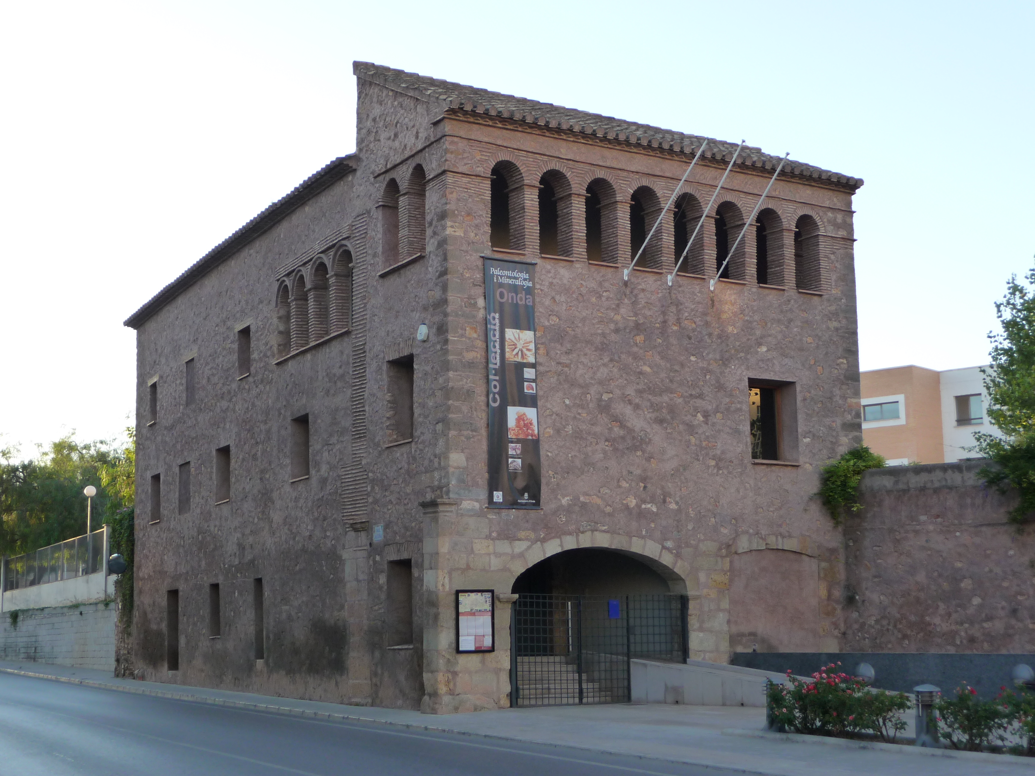 Vista exterior del Molí de la Reixa, declarado Bien de Interés Cultural